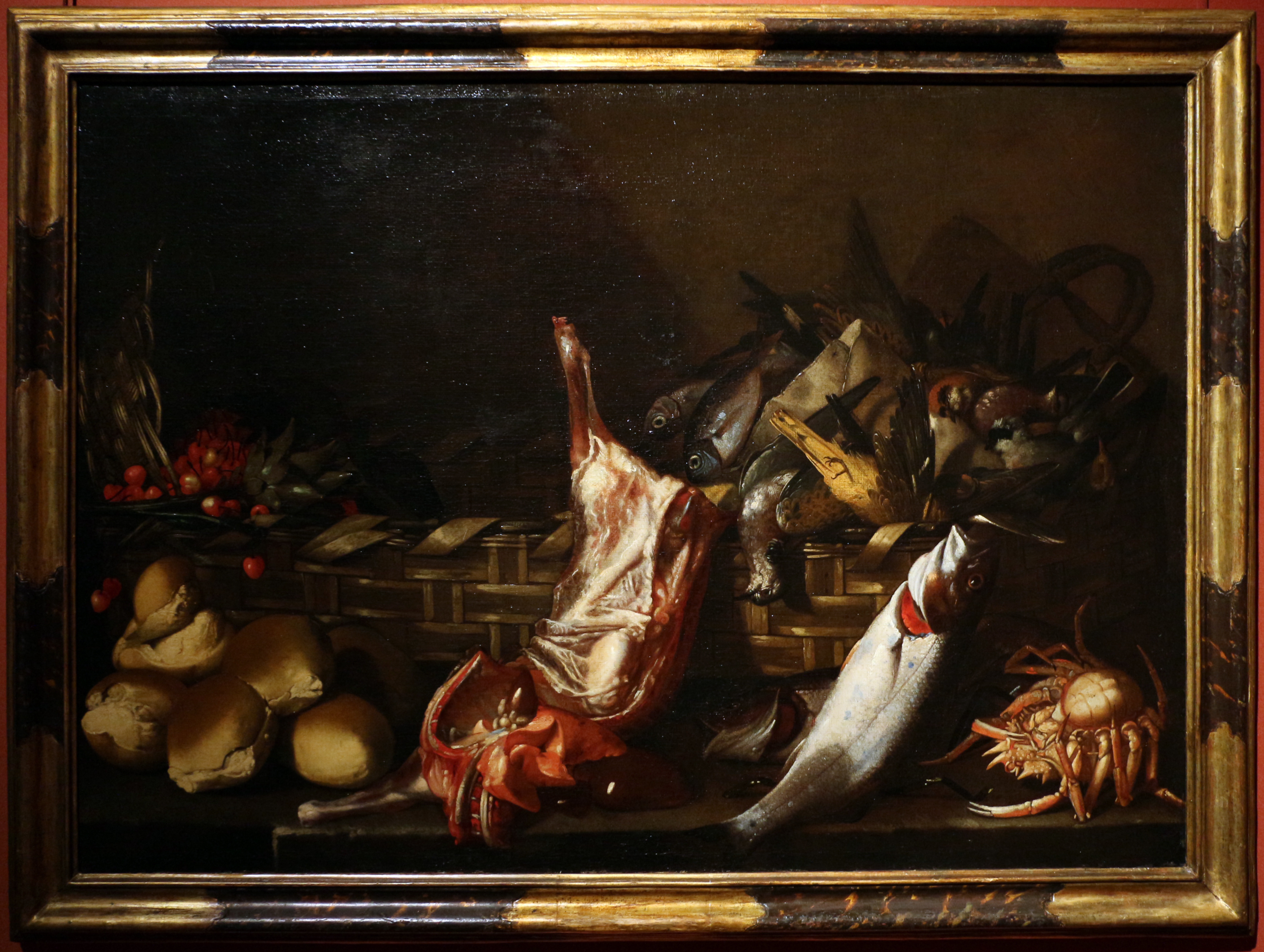 Still Life